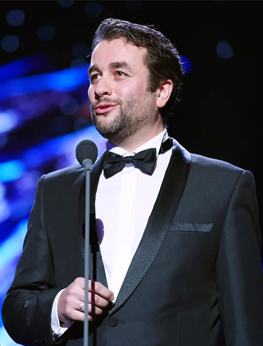 Vladimír Kobielsky, Krištáľové krídlo 2015.